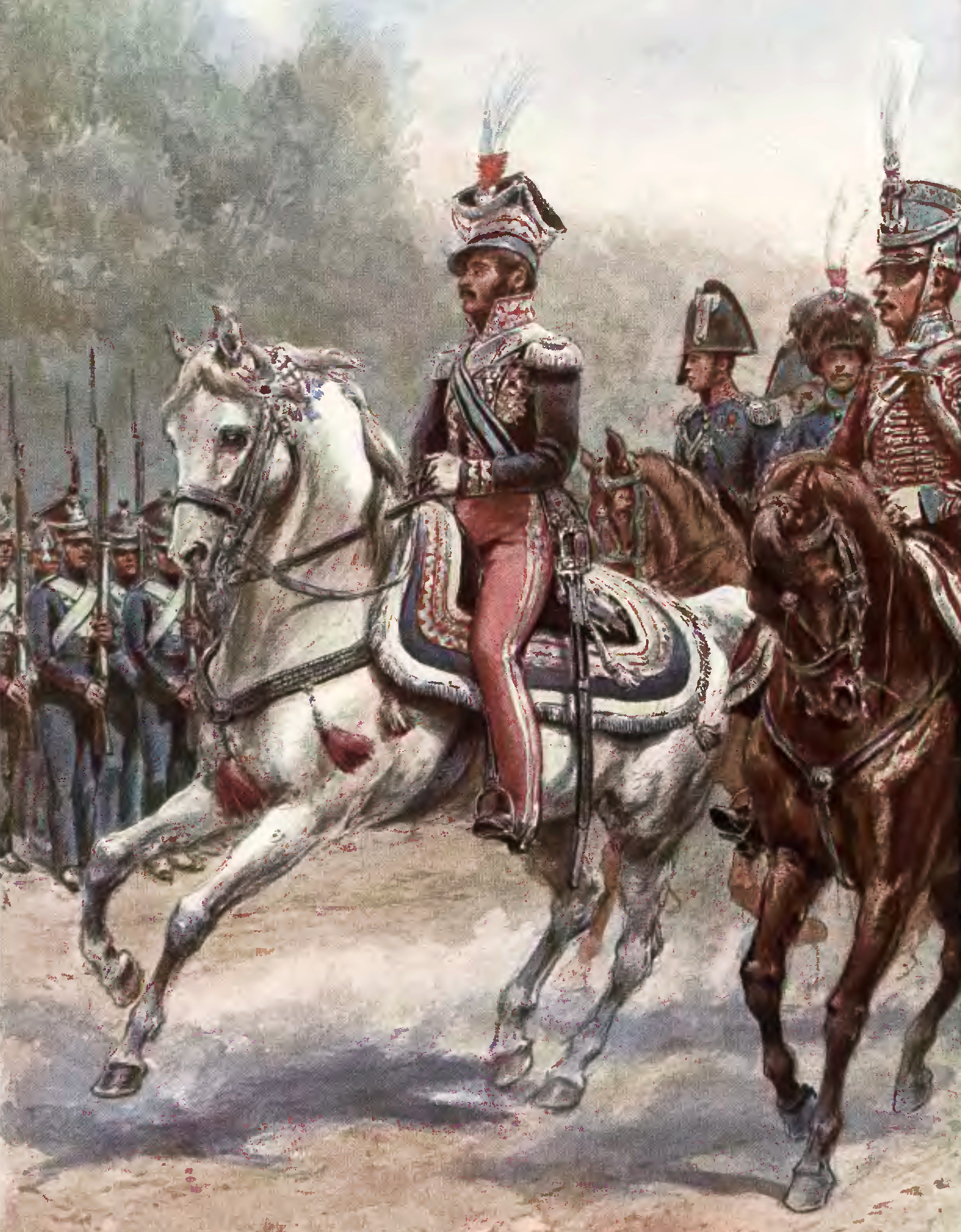 Generał dywizji Księstwa Warszawskiego